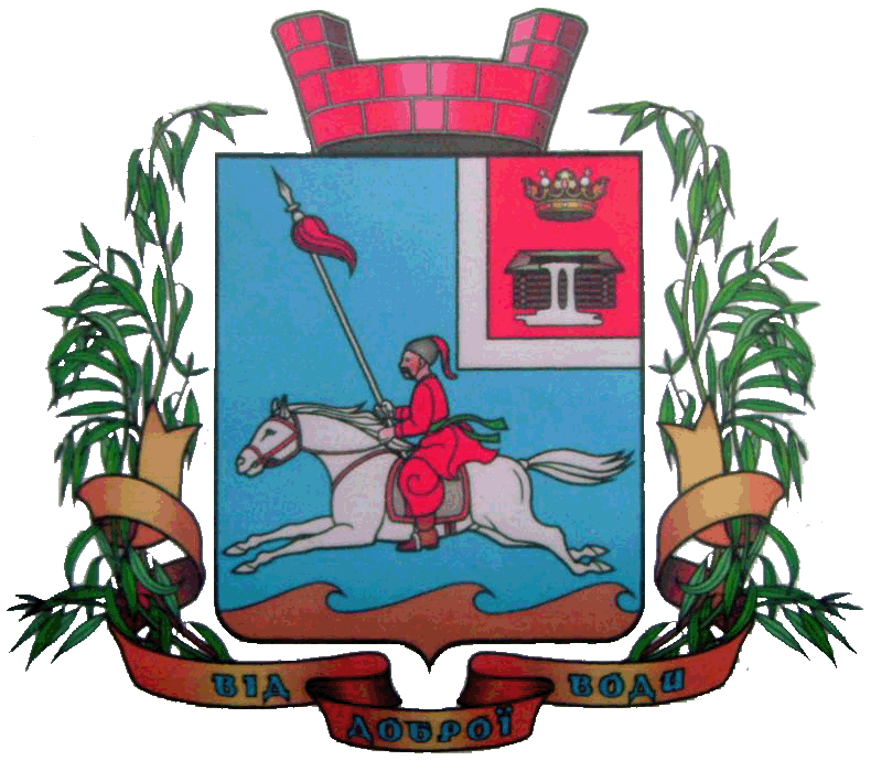 Герб Червоної Слободи